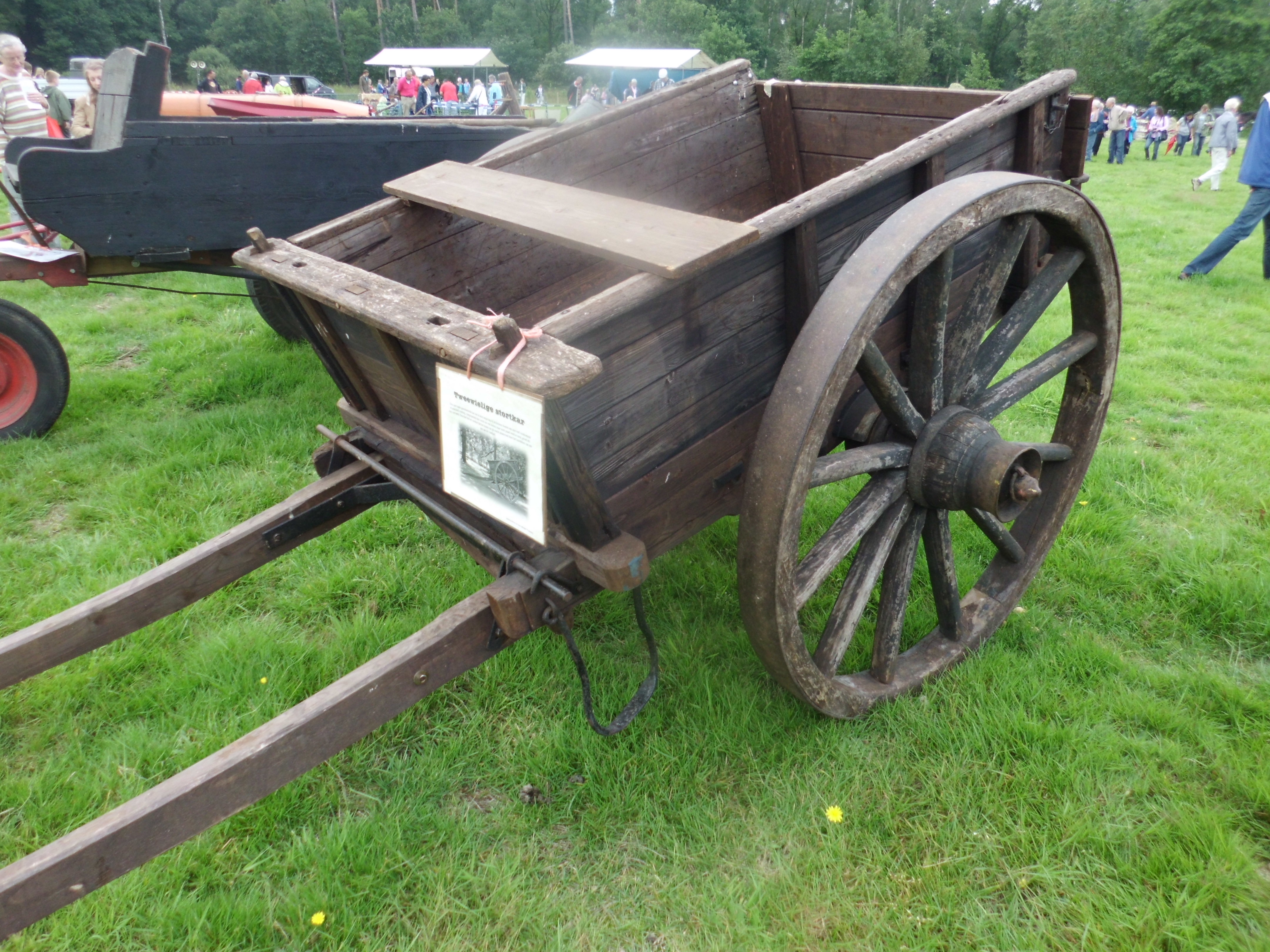 Tweewielige stortkar